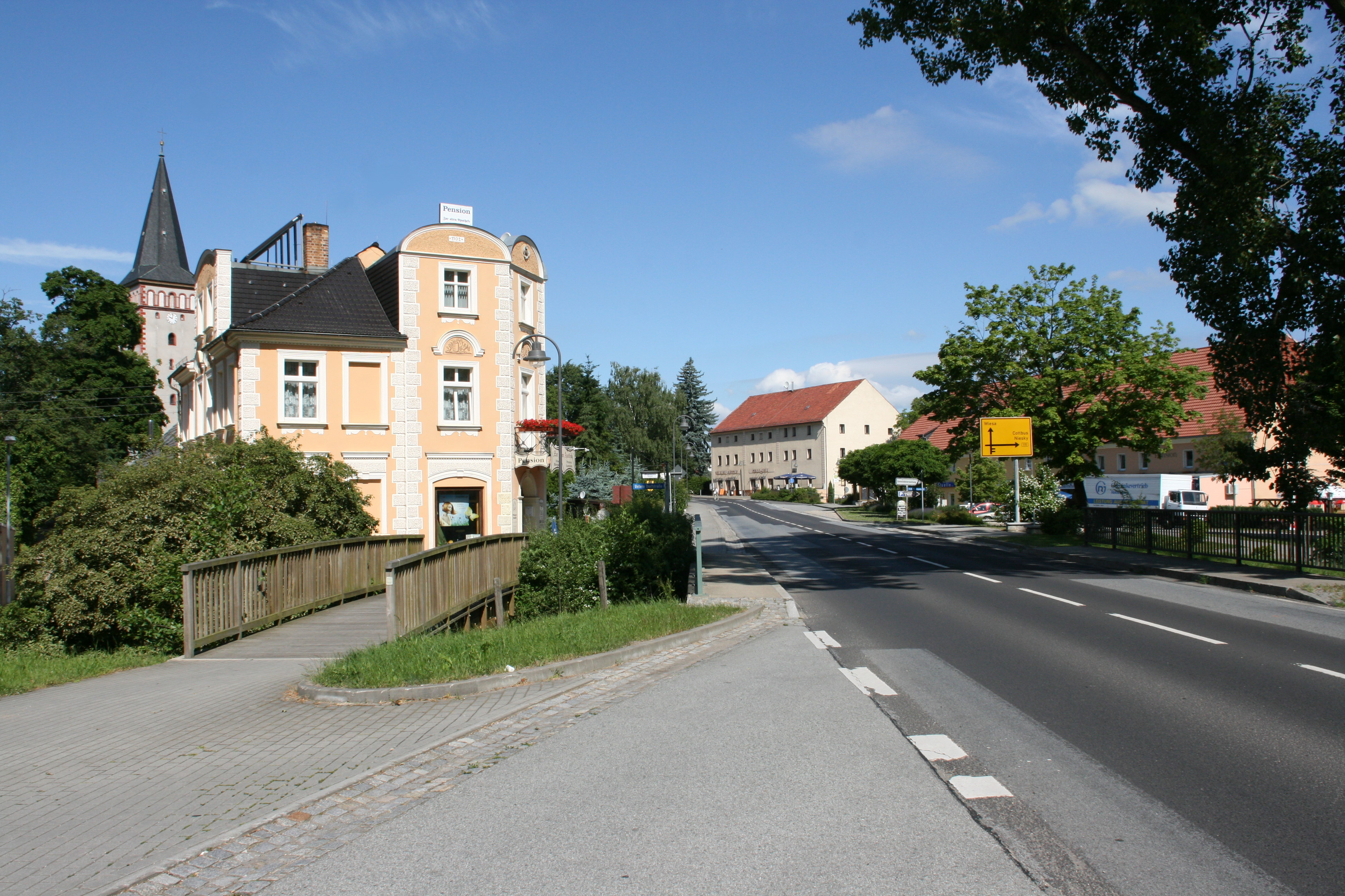 Straße der Einheit in Kodersdorf, Brücken über den Weißen Schöps